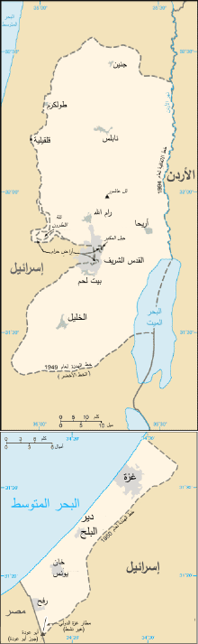 خارطة الضفة الغربيَّة وقِطاع غزَّة.